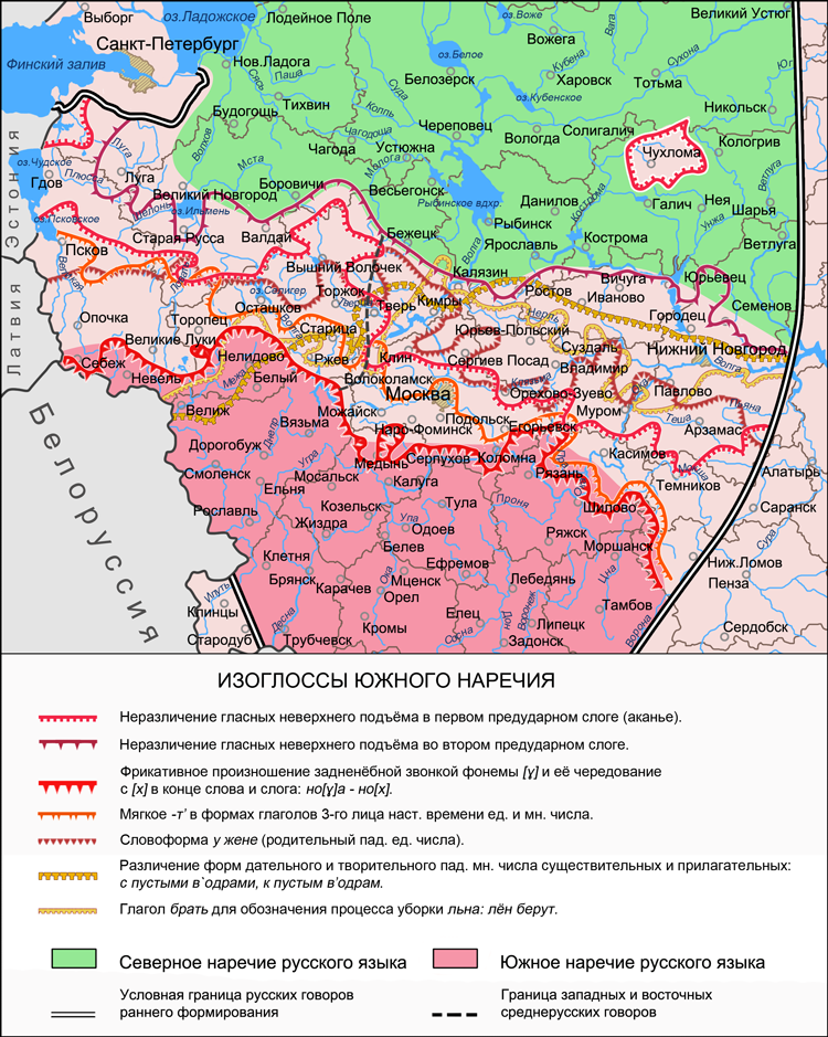 Карта изоглосс южного наречия на территории среднерусских говоров. На основе данных: Захарова К. Ф., Орлова В. Г. Диалектное членение русского языка. М.: Наука, 1970. 2-е изд.: М.: Едиториал УРСС, 2004 Язык русской деревни